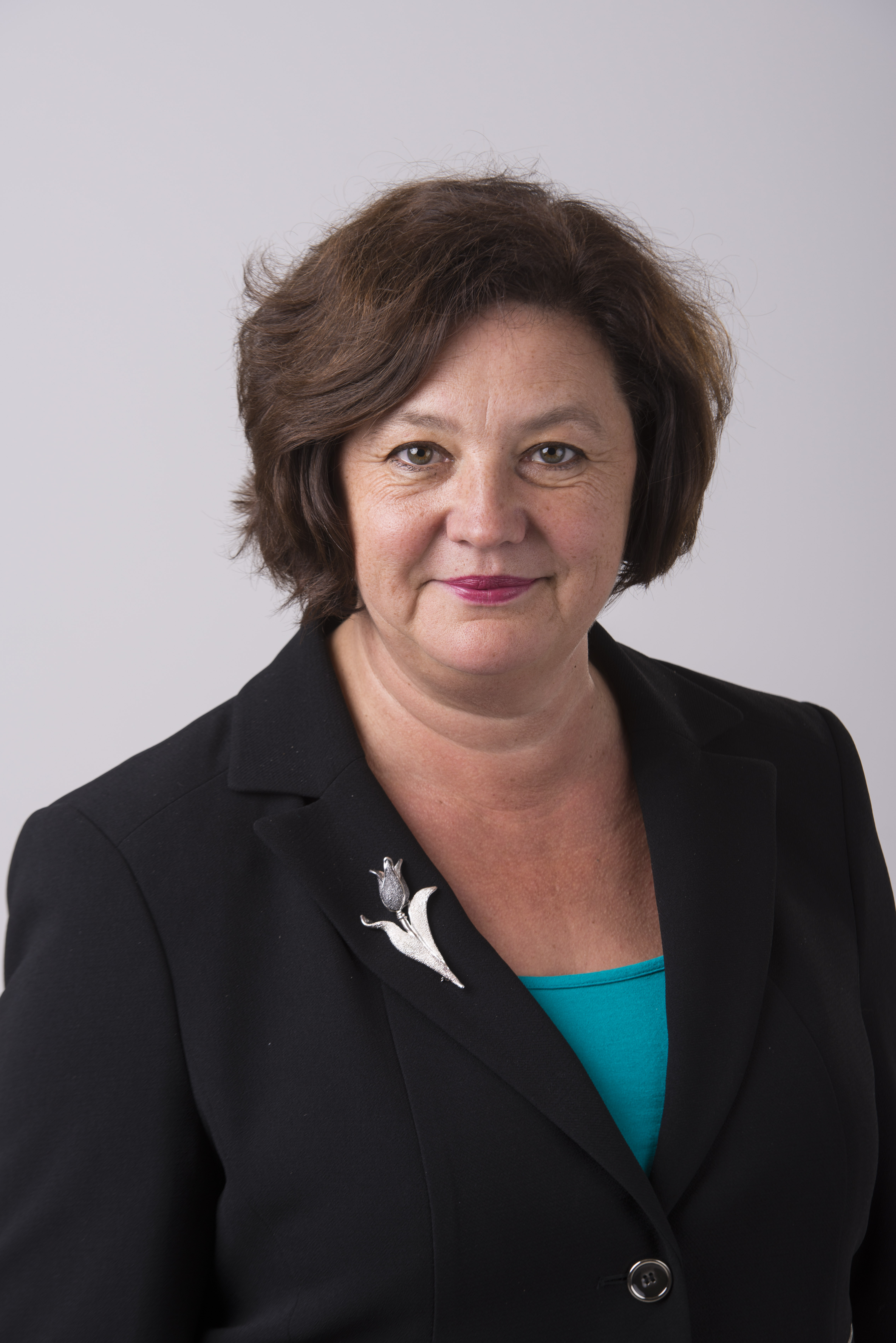 2014.gada 9.decembris. 12.Saeimas deputāte Nellija Kleinberga. Foto: Reinis Inkēns, Saeimas Kanceleja Izmantošanas noteikumi: saeima.lv/lv/autortiesibas